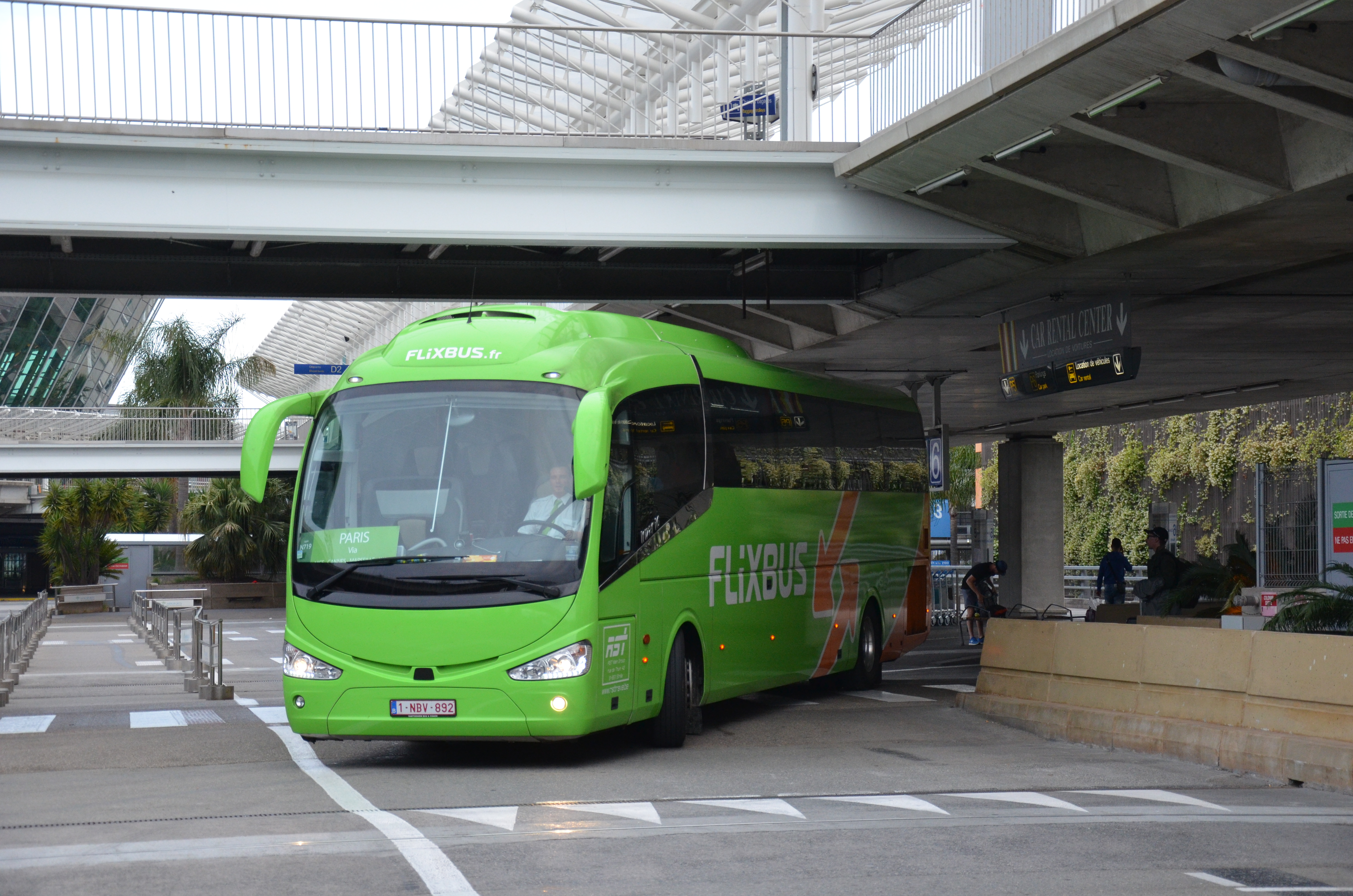 Irizar i6 de la compagnie Flixbus, à l'aéroport de Nice Côte d'Azur.